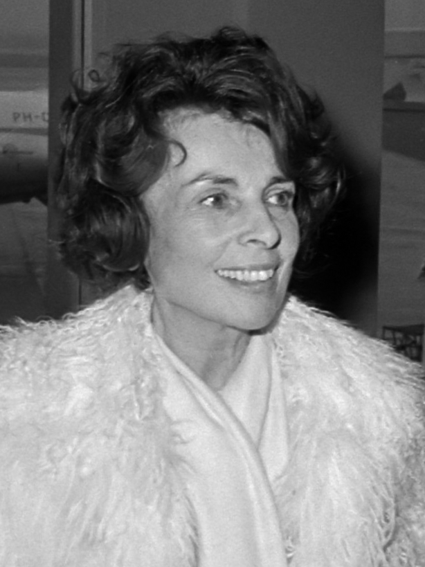 Franse actrices voor Cinemanifestatie op Schiphol 2 februari 1972